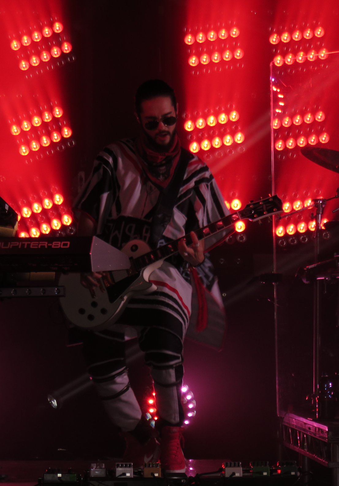 Tom Kaulitz spielt im Volkshaus in Zürich, Schweiz.